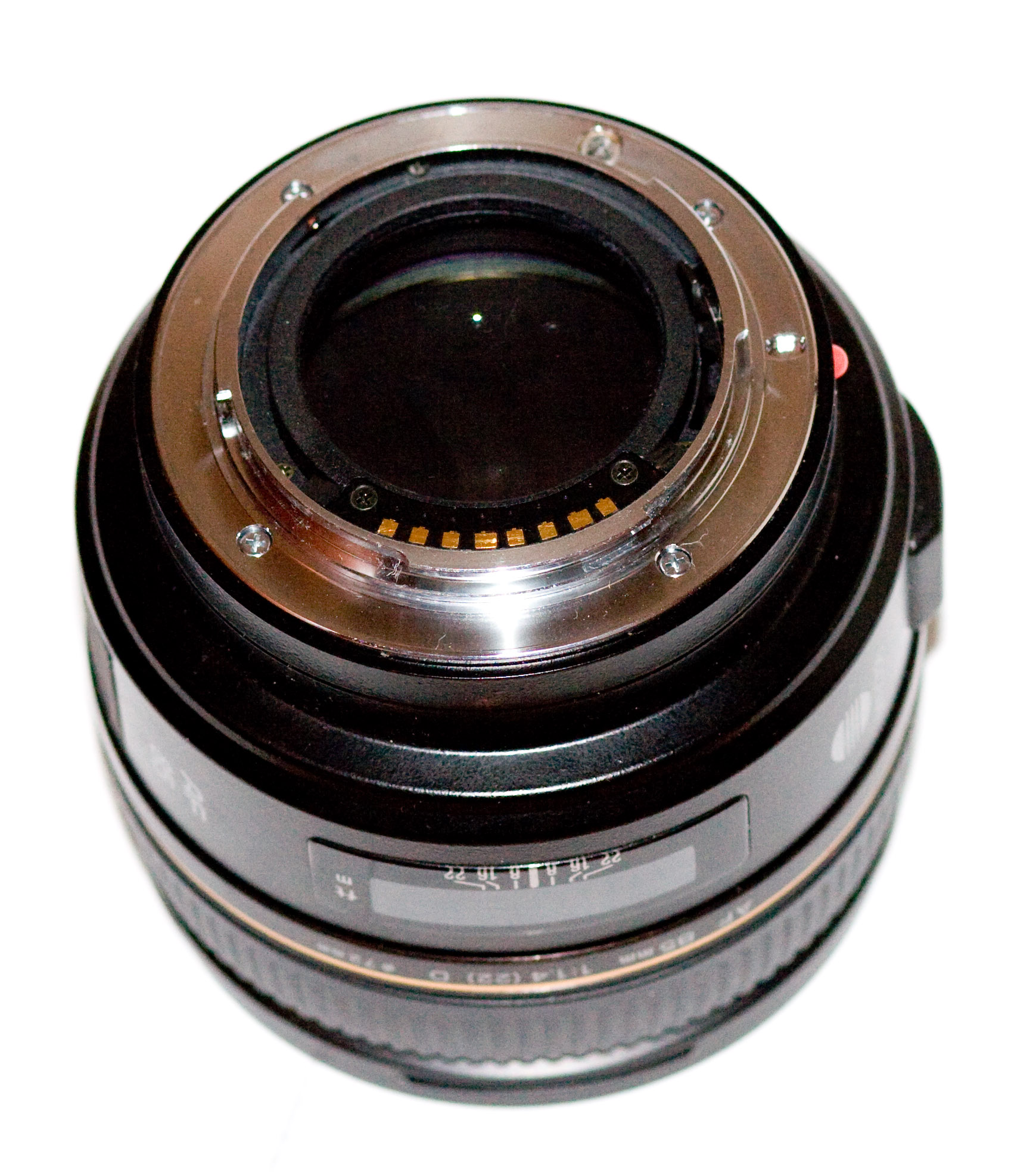 Minolta 85/1.4 G D lens mount